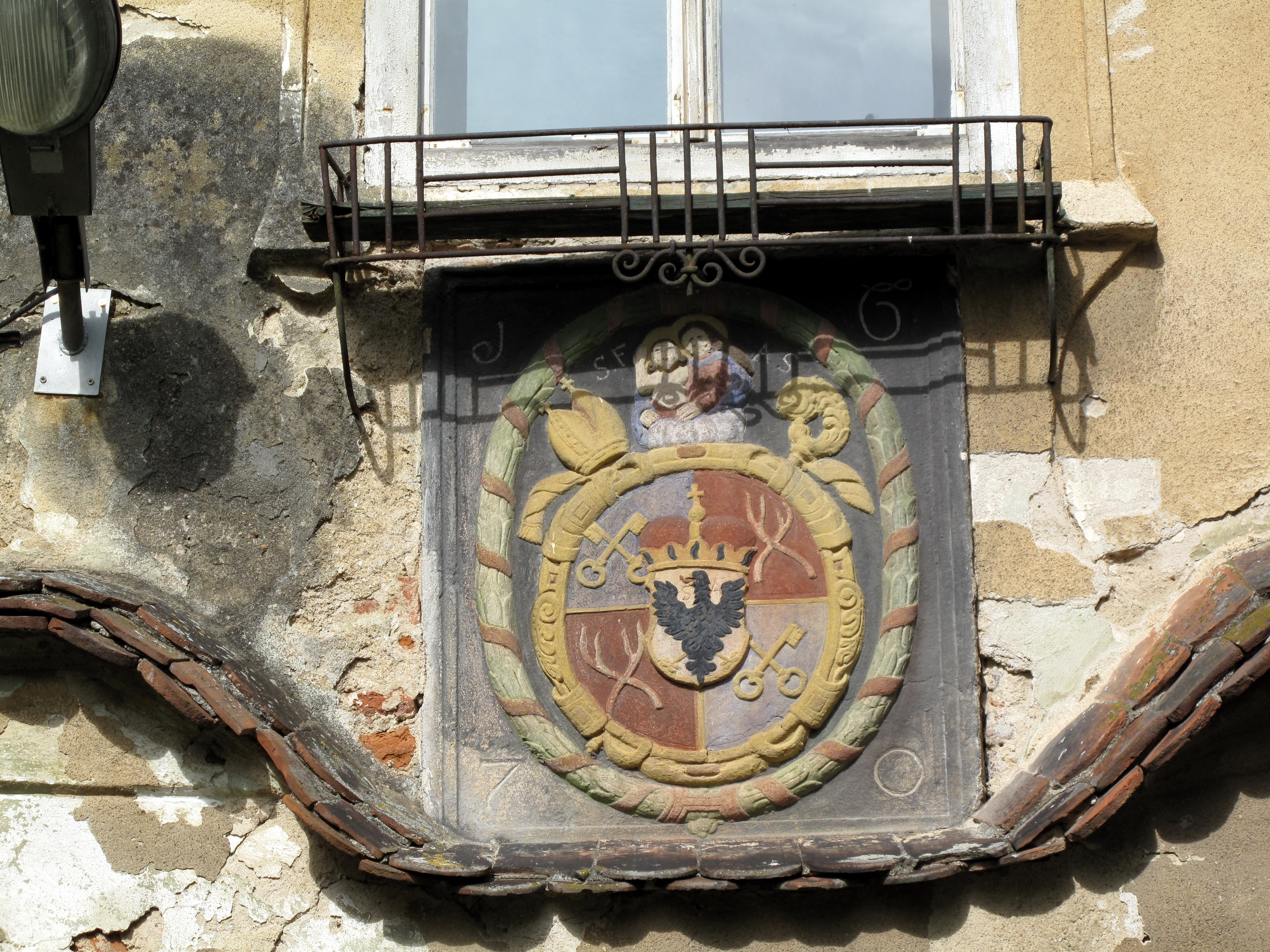 Želiv, znak na bráně